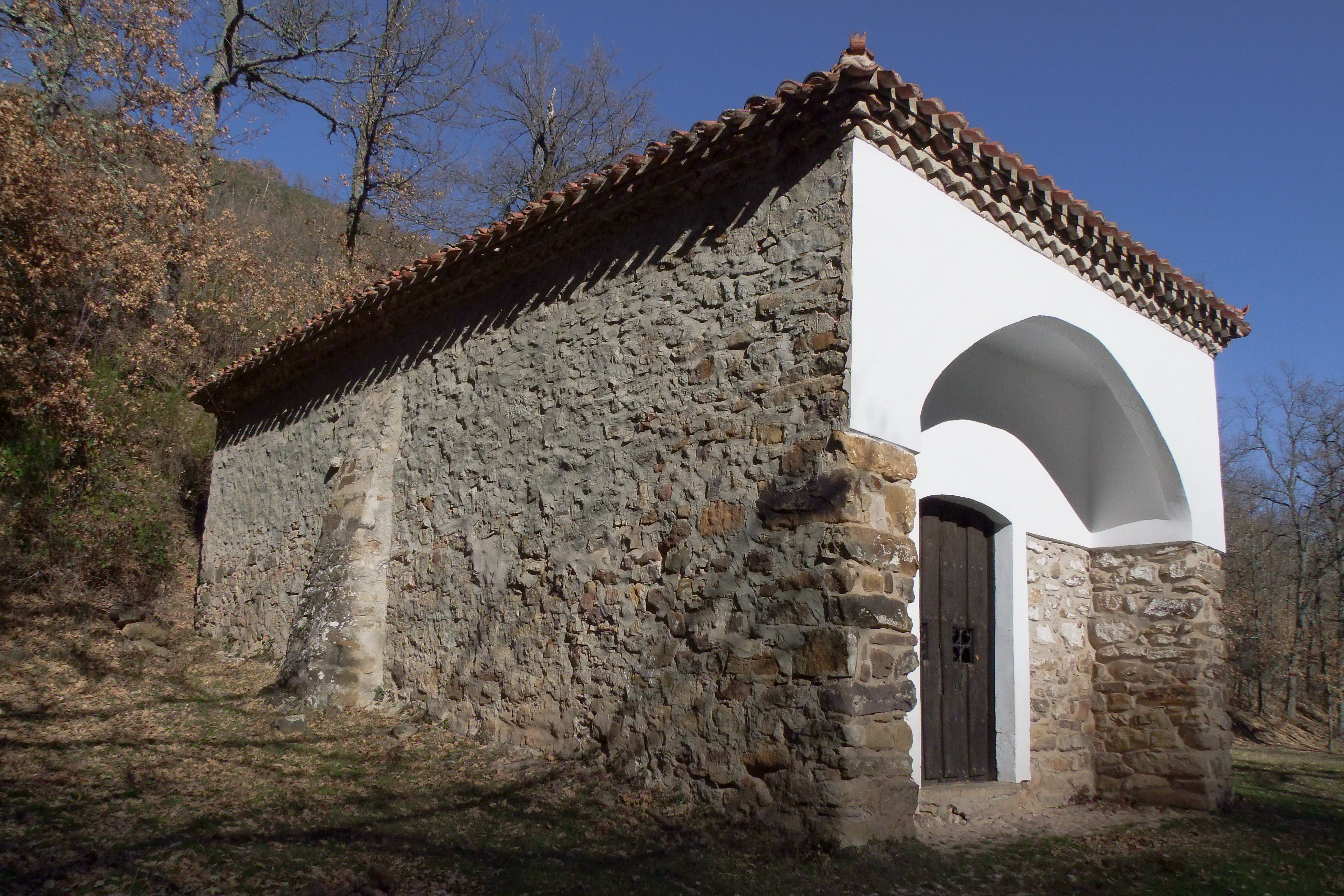 Ermita de Santo Domingo en Laguna de Cameros, La Rioja - España